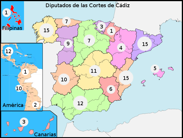 Diputados de las cortes de Cádiz 1812